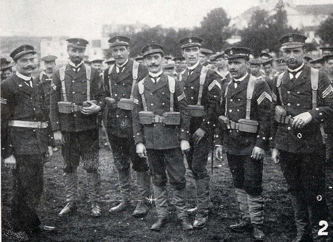 Sargentos de marinha que iriam combater em Angola os Cumatas. Foto tirada na Terra do Desembargador, Belém (Lisboa)